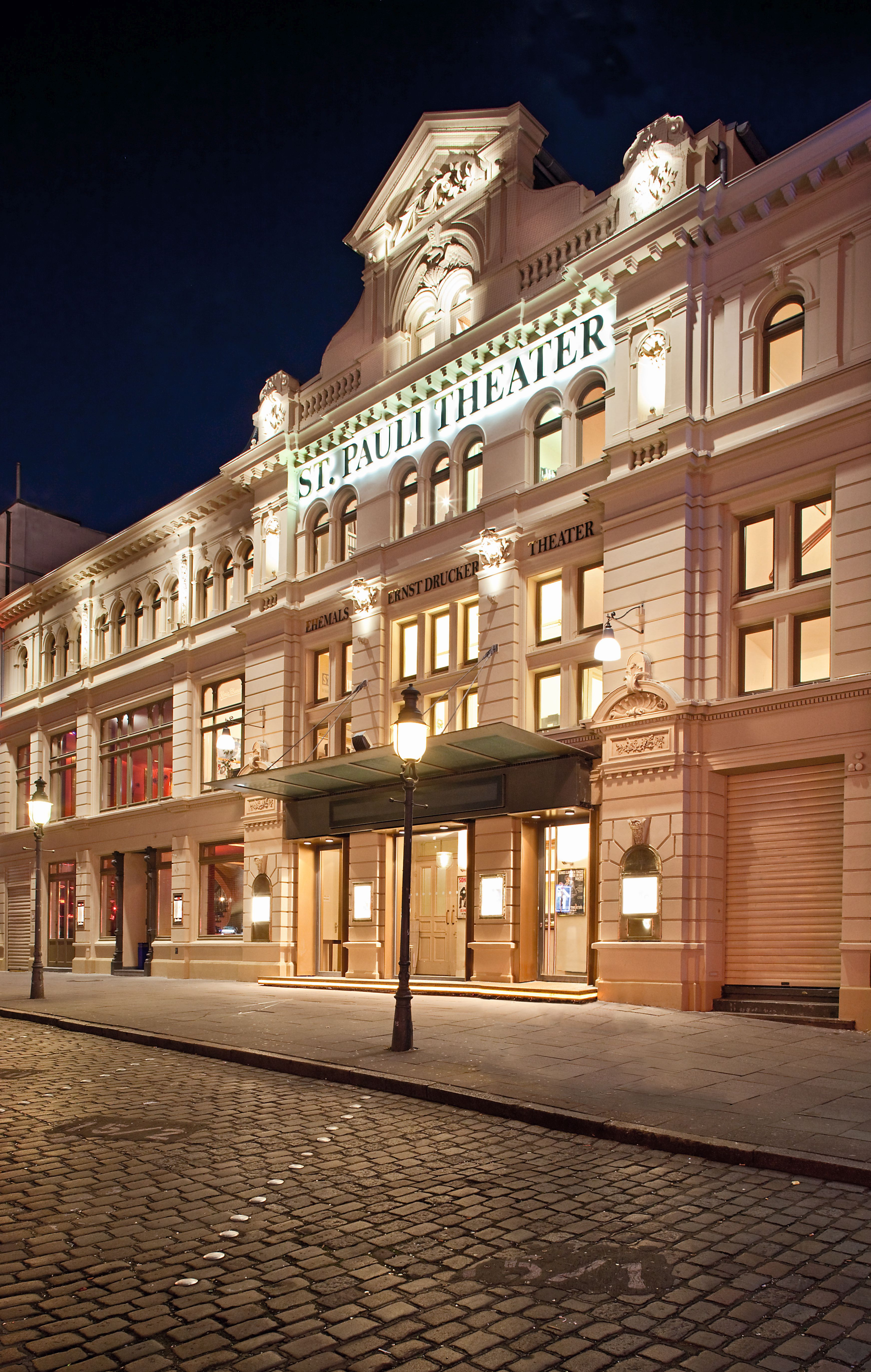 am Spielbudenplatz